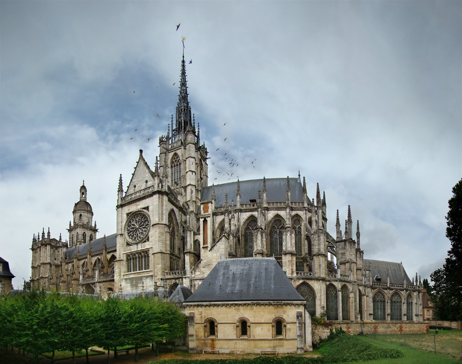 Notre-Dame d'Évreux, Eure, Normandie, France.